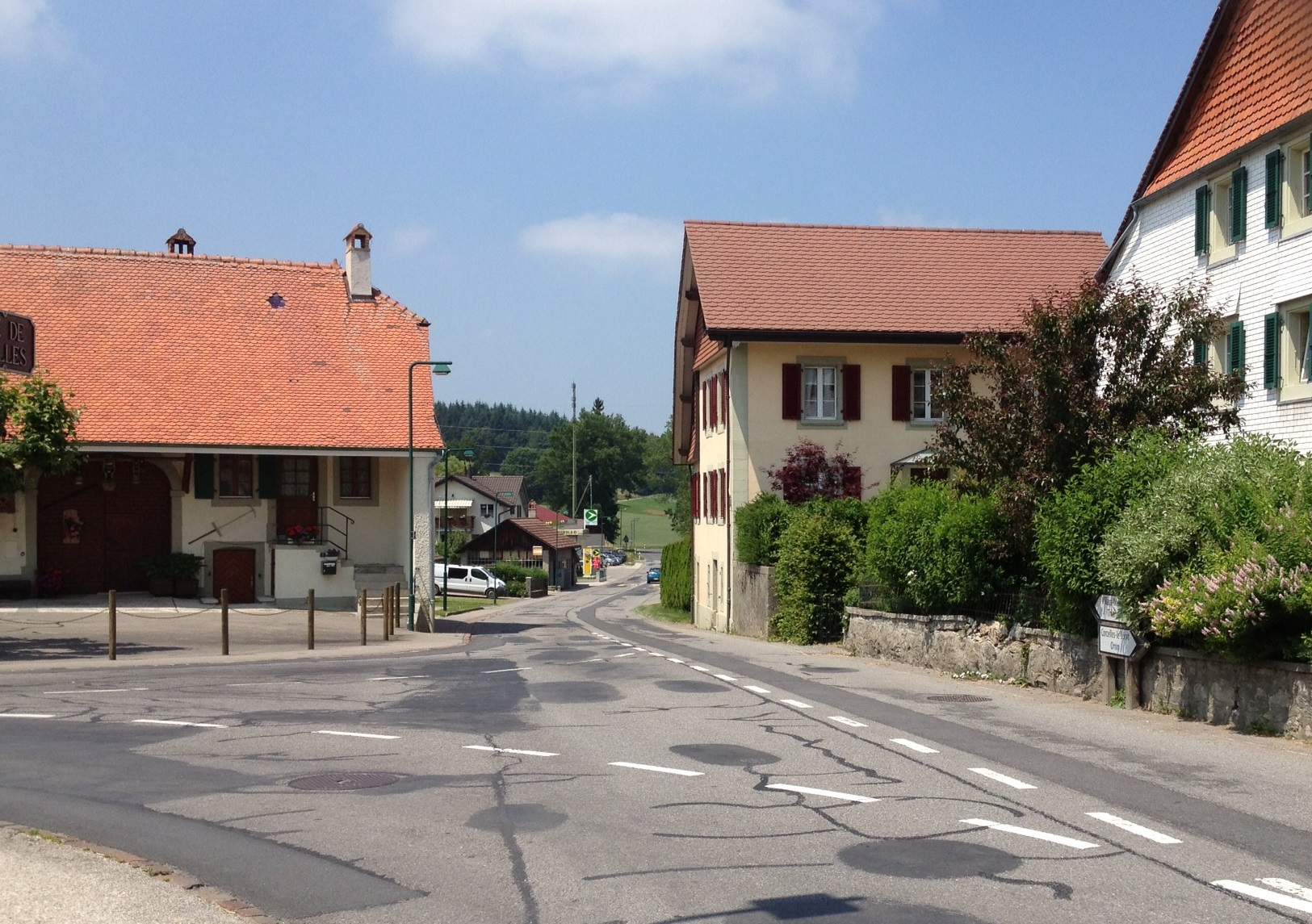 Peney-le-Jorat dans la commune suisse de Jorat-Menthue